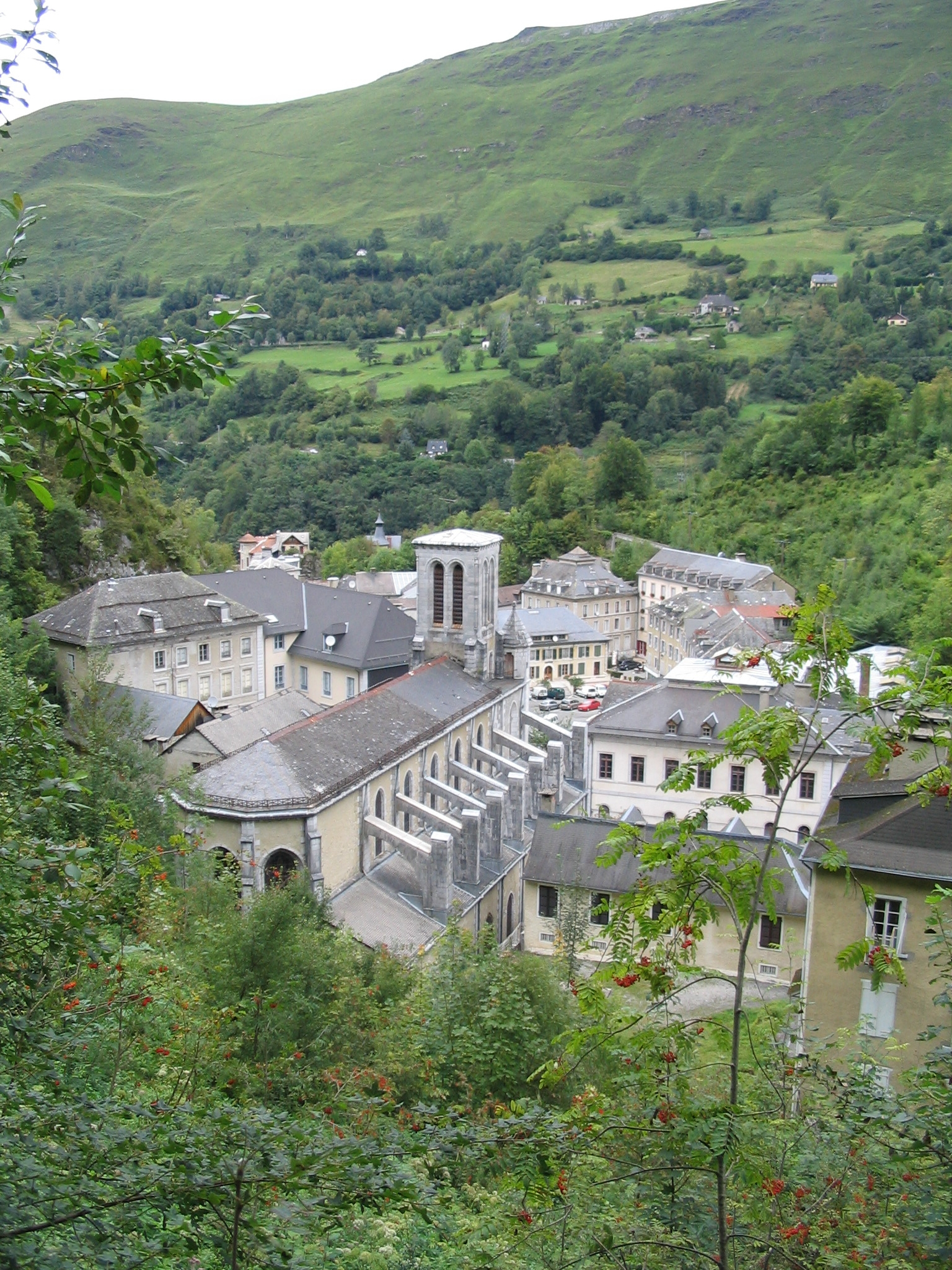 Eaux-Bonnes, Pyrénées Atlantiques, France